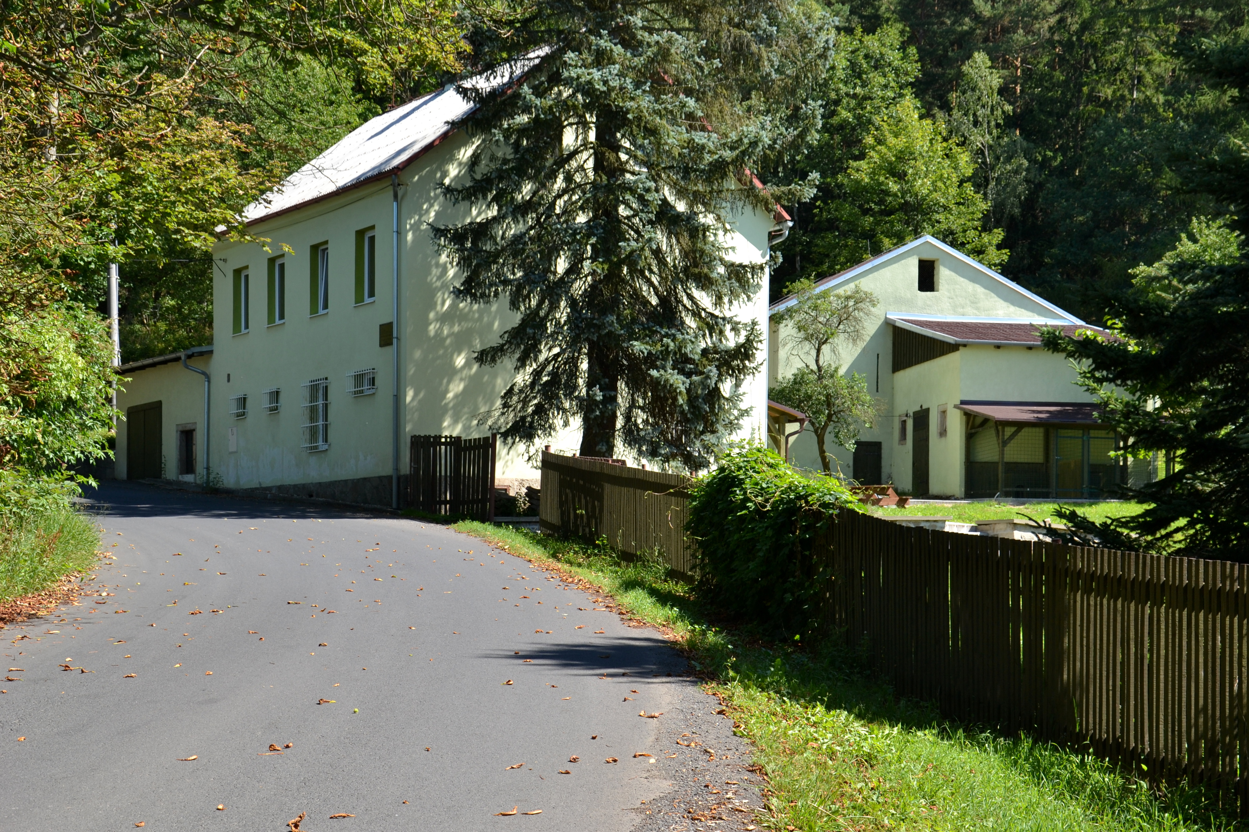 Činov – dům čp. 2